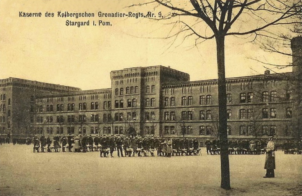 Garnizon Stargard, około 1890/1914 r. Kompleks czerwone koszary